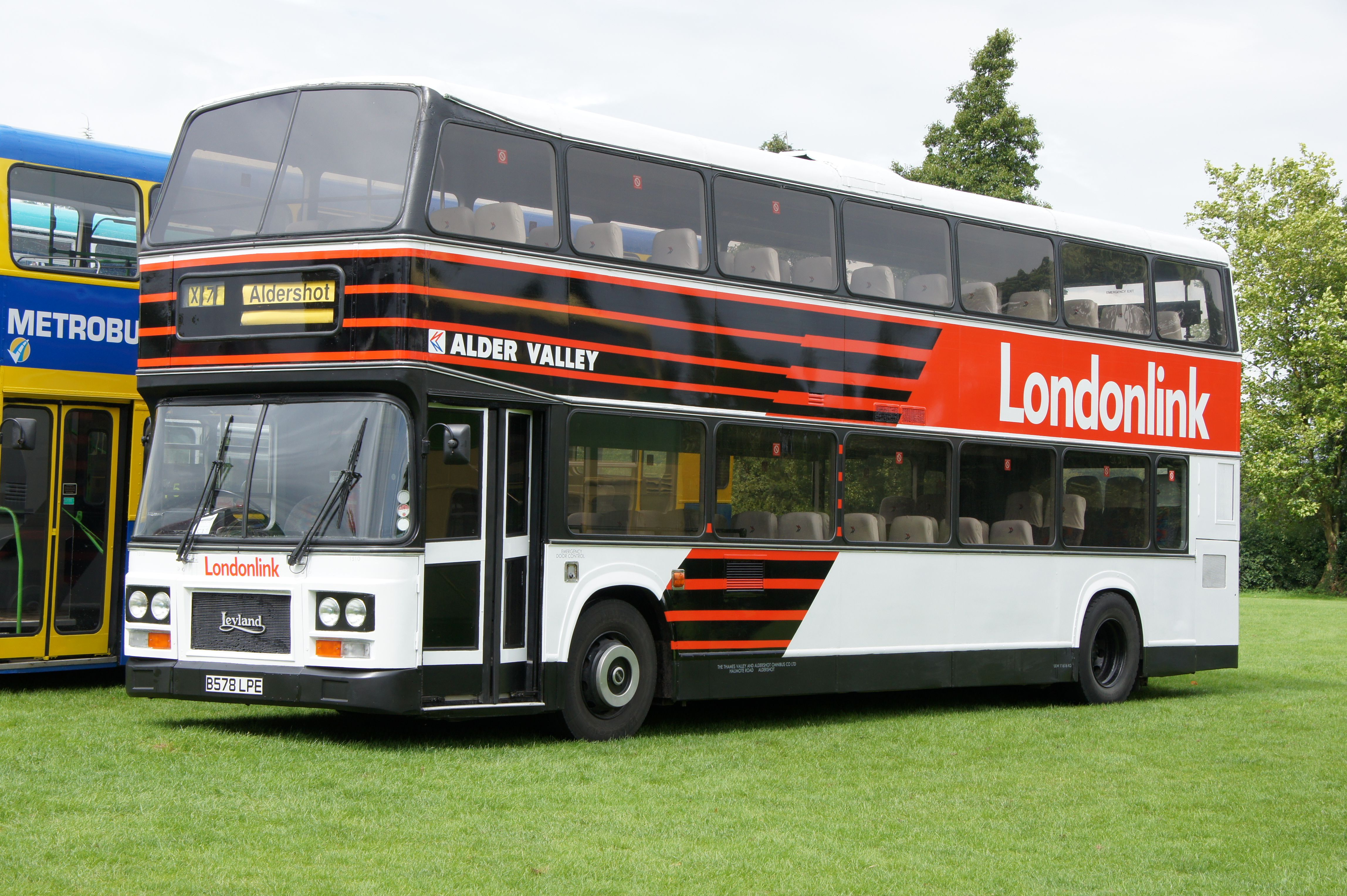 B578LPE-1 170711 CPS